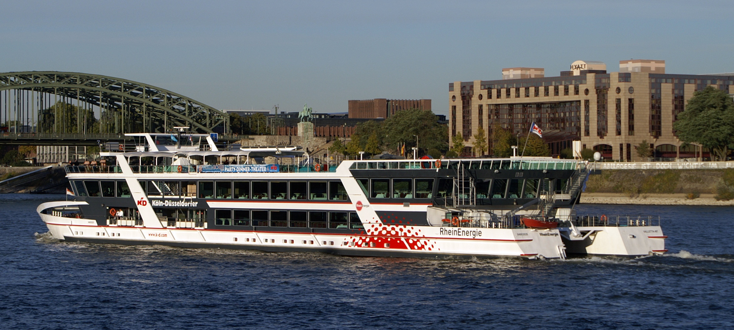 Die MS RheinEnergie zwischen der Deutzer Brücke und der Hohenzollernbrücke in Köln.